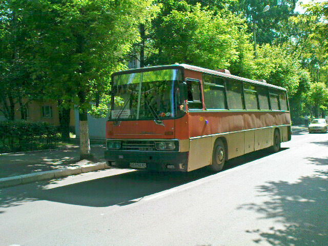 Ікарус